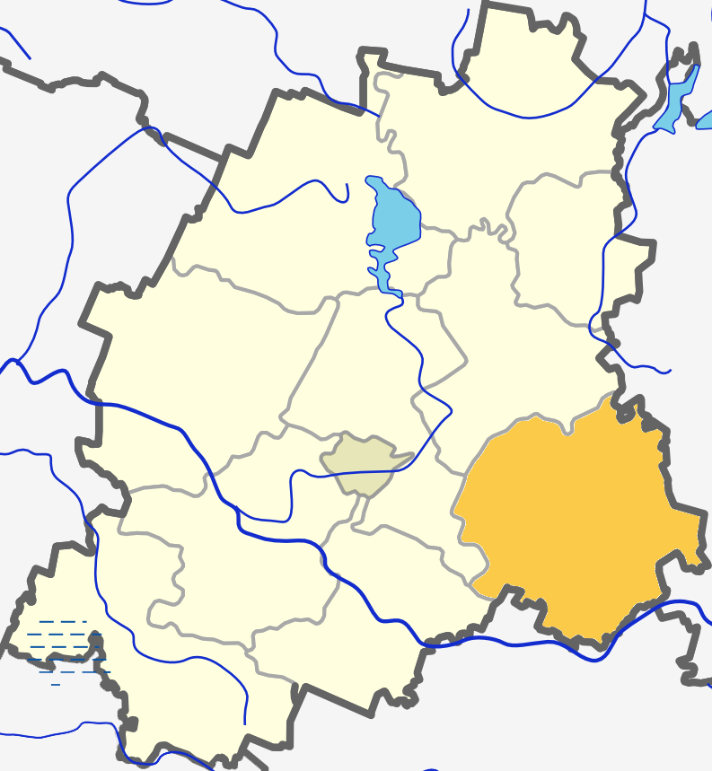 Расположение Жлибинайского староства на карте Плунгеского района